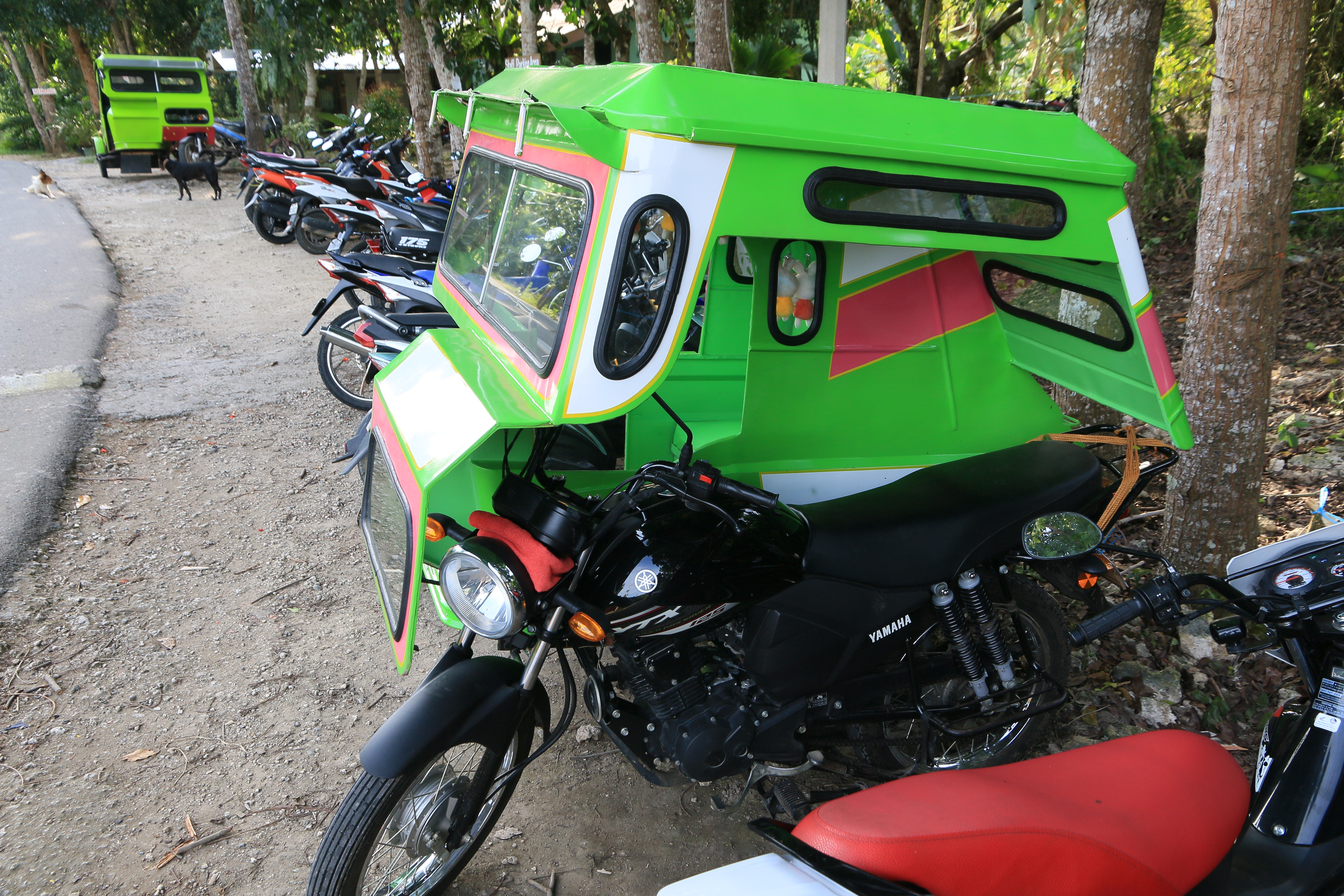 New tricycle at Bohol